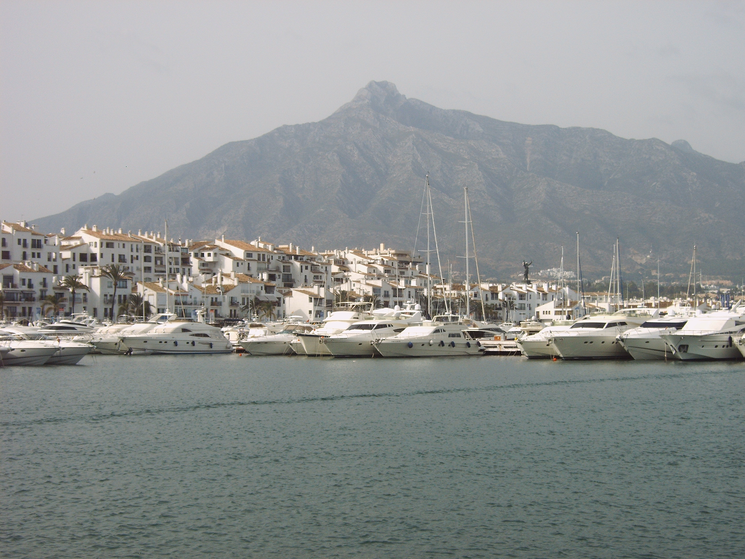 Beschreibung: Puerto Banús Quelle: selbst fotografiert Datum: 11.06.2006